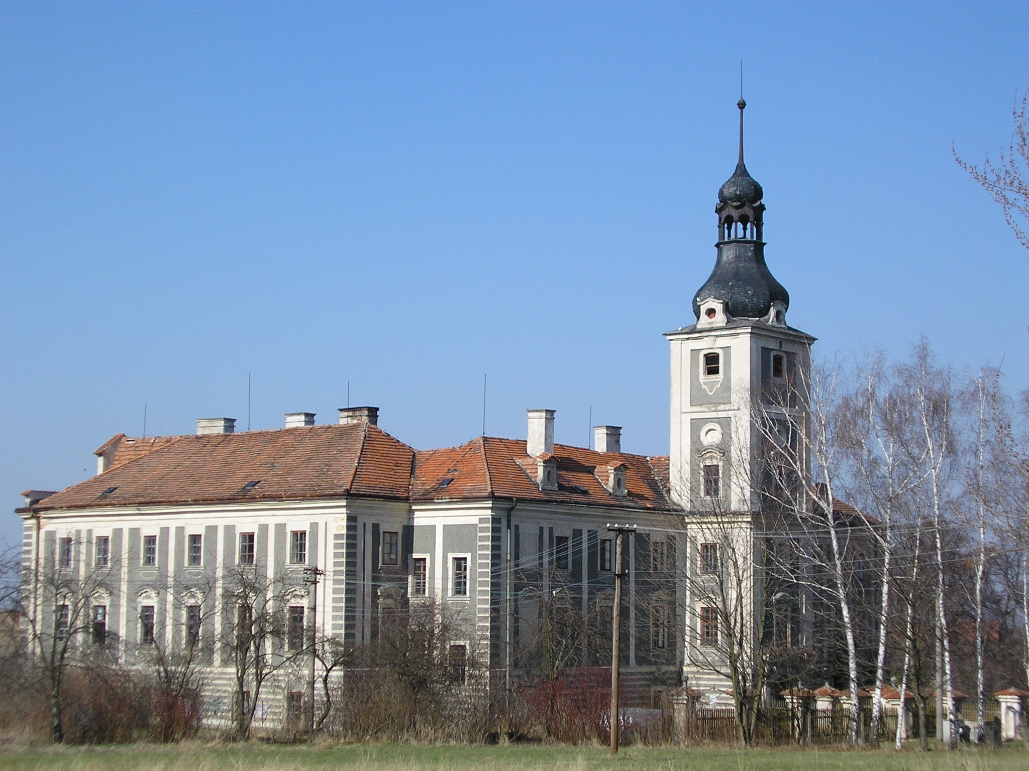 Zámek Tupadly, Tupadly 1, Tupadly (okres Kutná Hora).